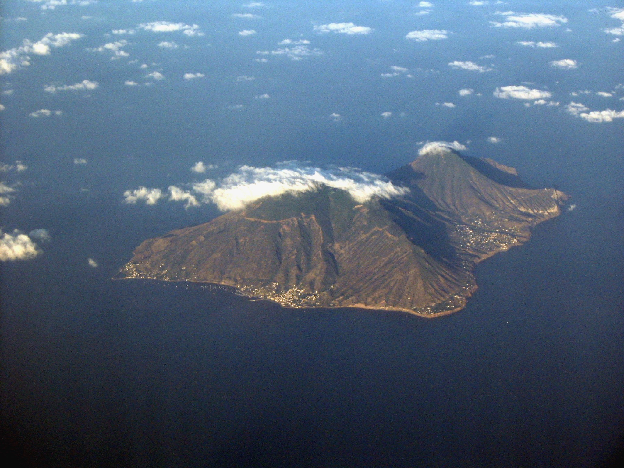 Monte Fossa delle Felci e Monte dei Porri (Salina, Sicilia, Italia)Milazzo 2005 301